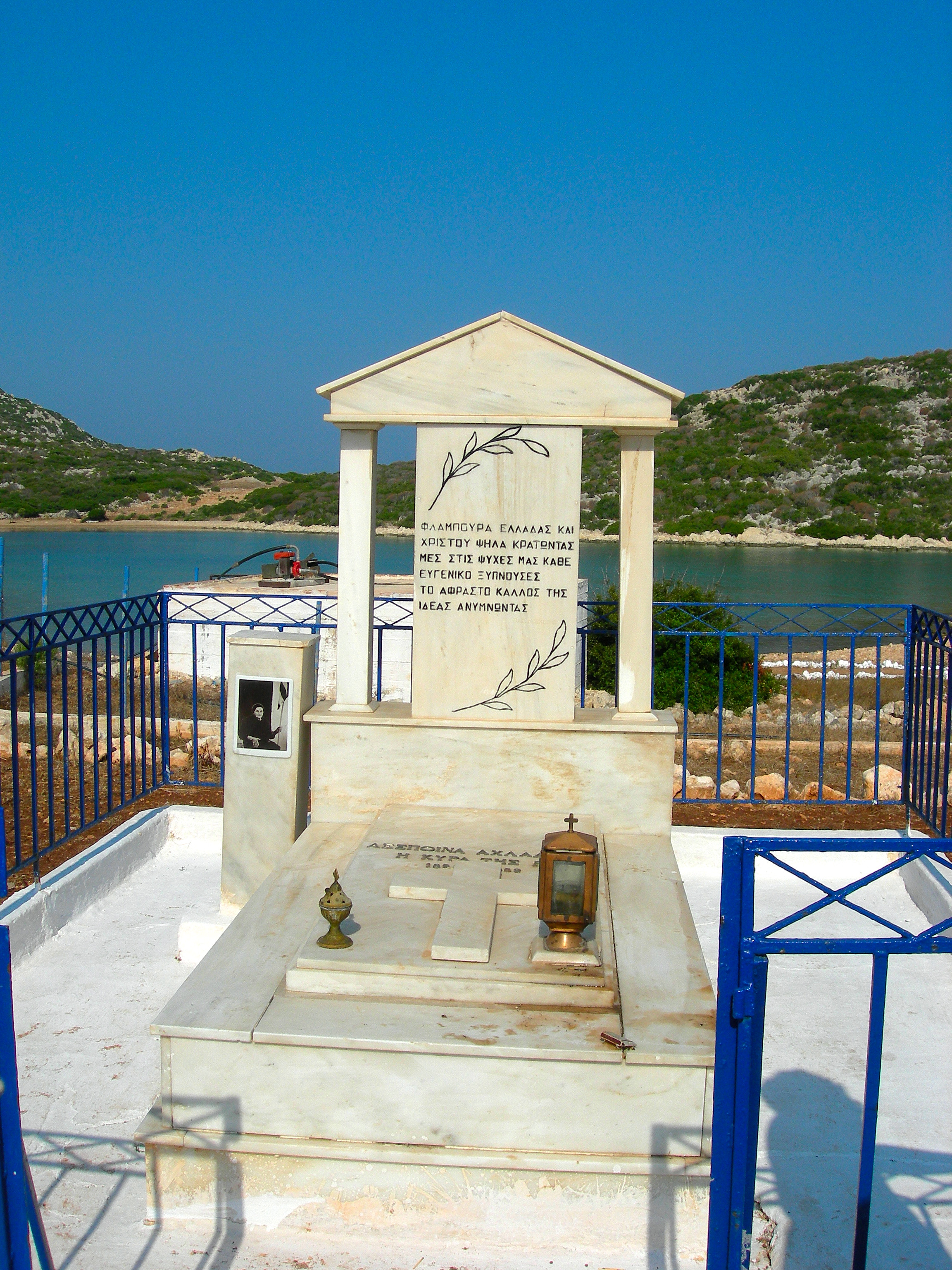 Ο τάφος της Κυράς της Ρω στο νησί Ρω. This is a photography of Natura 2000 protected area with ID GR4210004